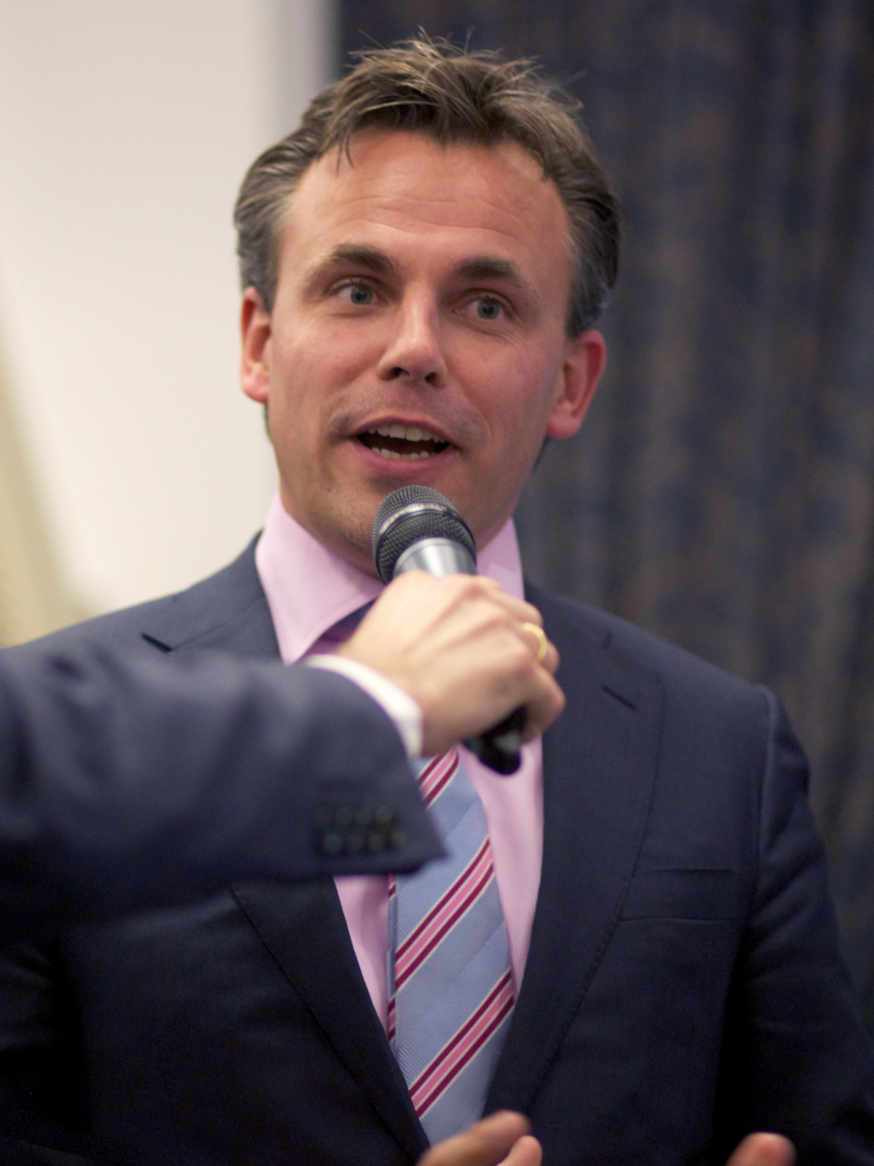 Mark Harbers Nationaal Archief & Spaarnestad Photo join Wikipedia